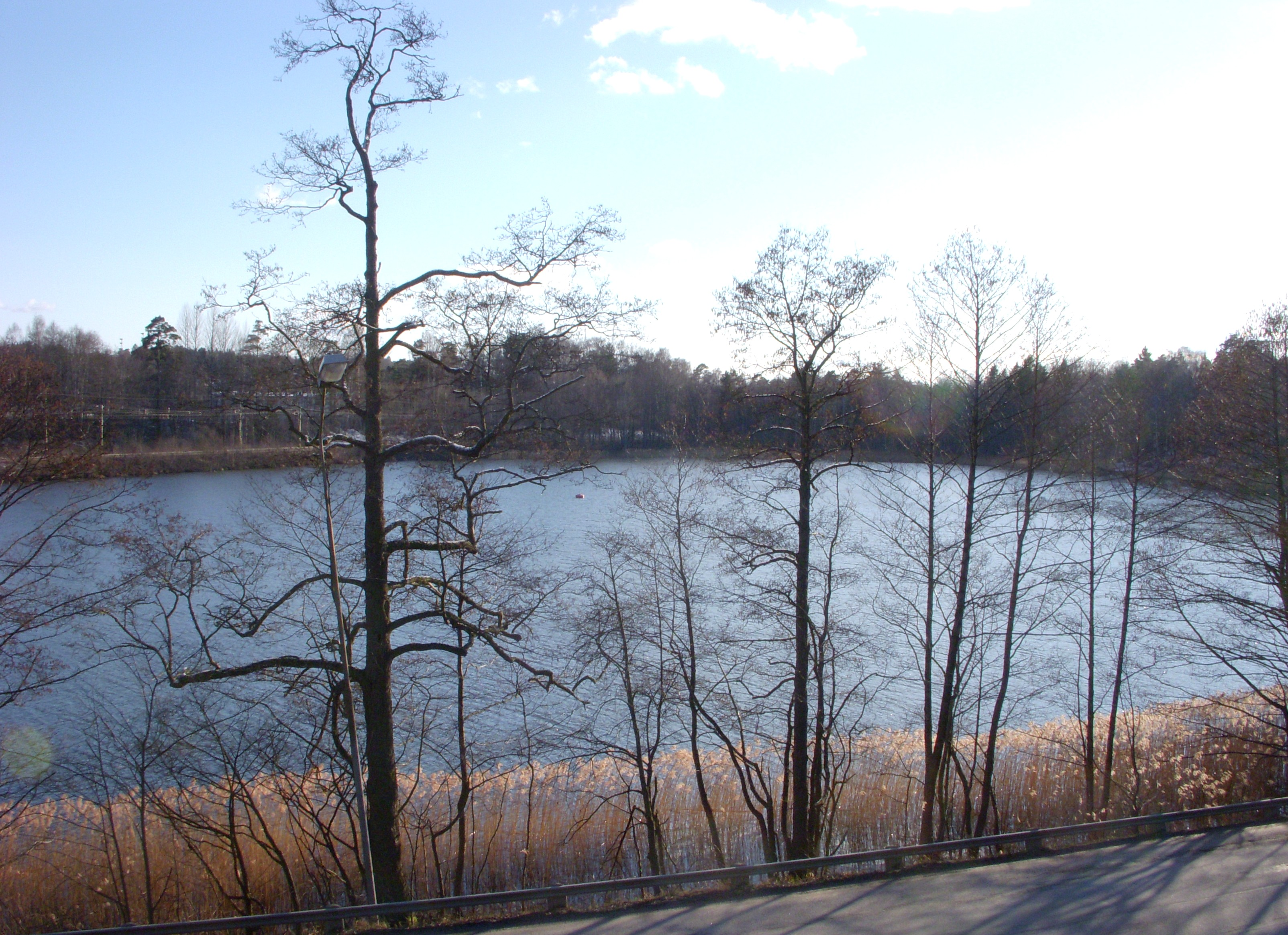 Kvarnsjön Tumba